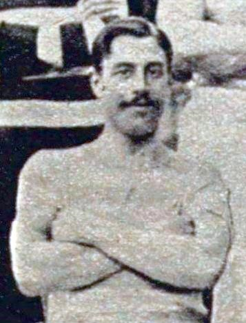 Gustave Duchamps, Champion de France du saut à la perche en 1893 et 1894.